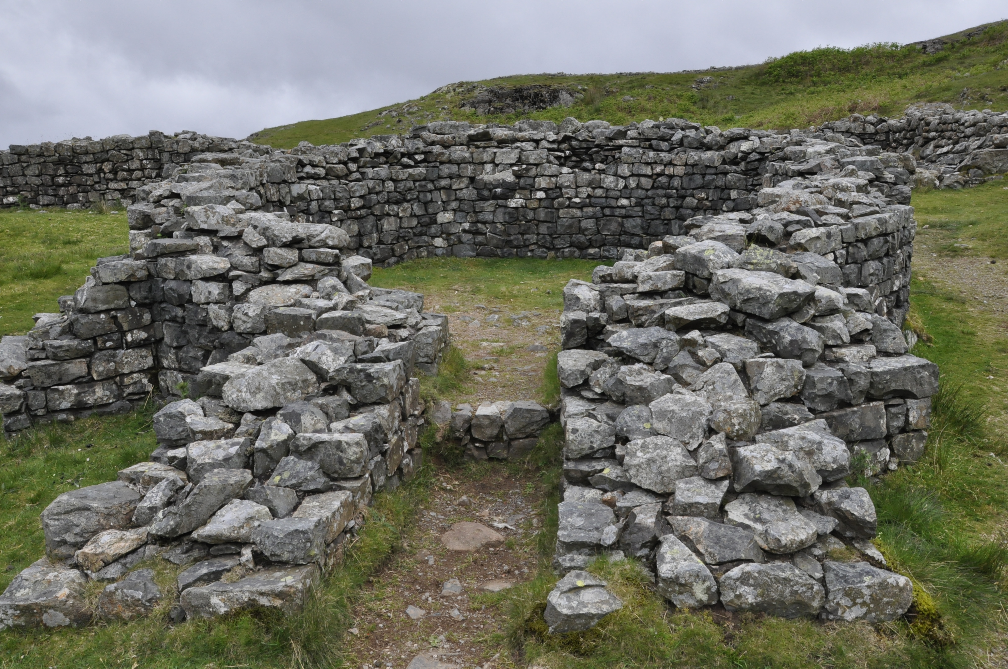 Sudatorium of caldarium van het Hardknott Roman Fort, Lake District, Engeland